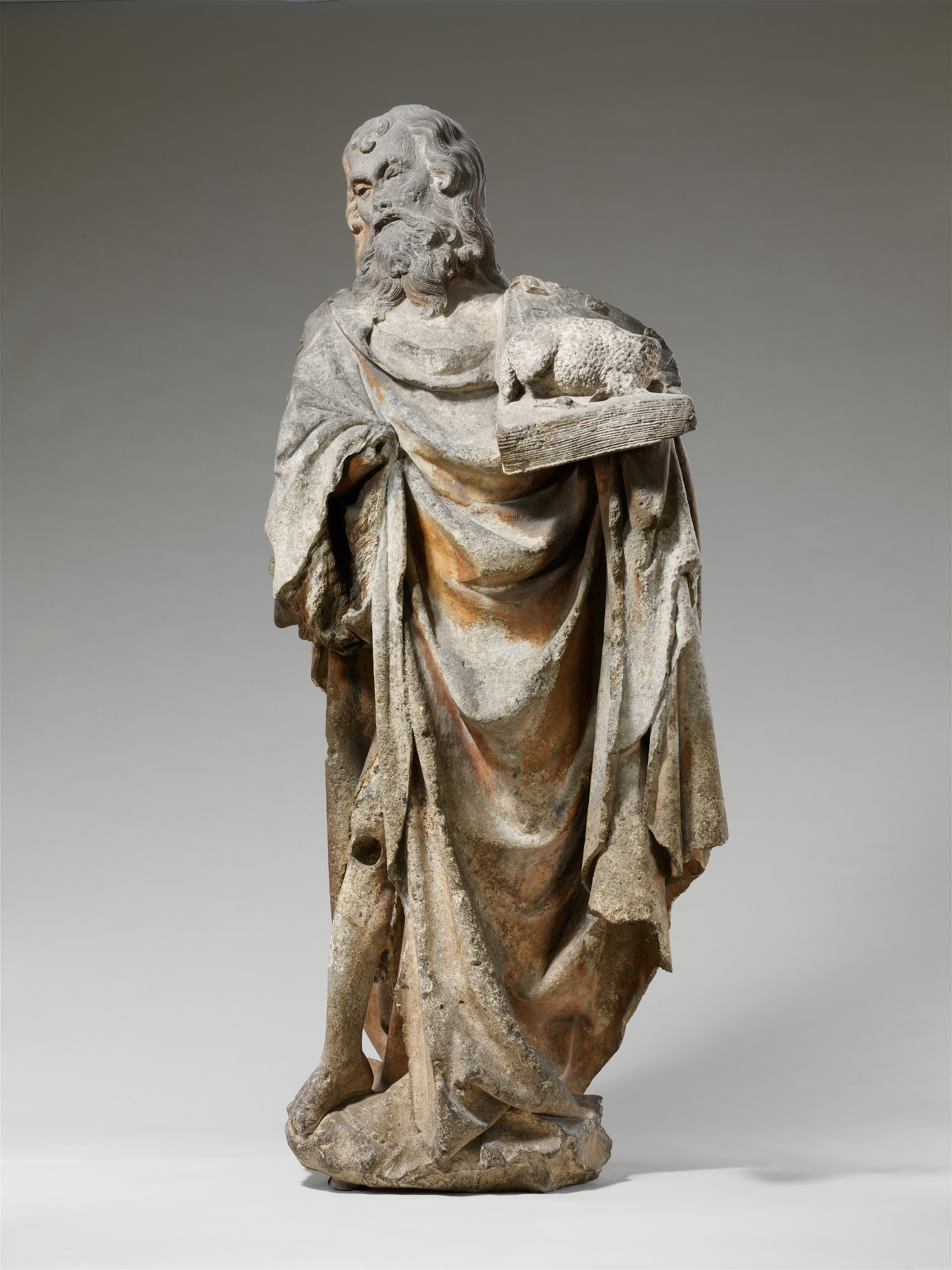 French; Statue; Sculpture-Stone